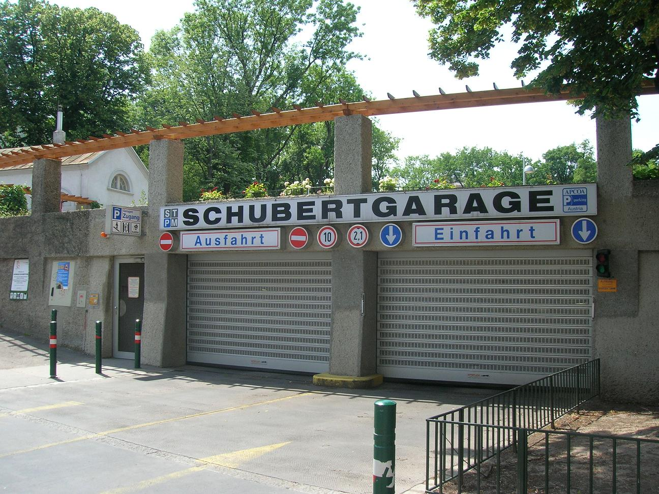 Garage unter dem Schubertpark, Wien